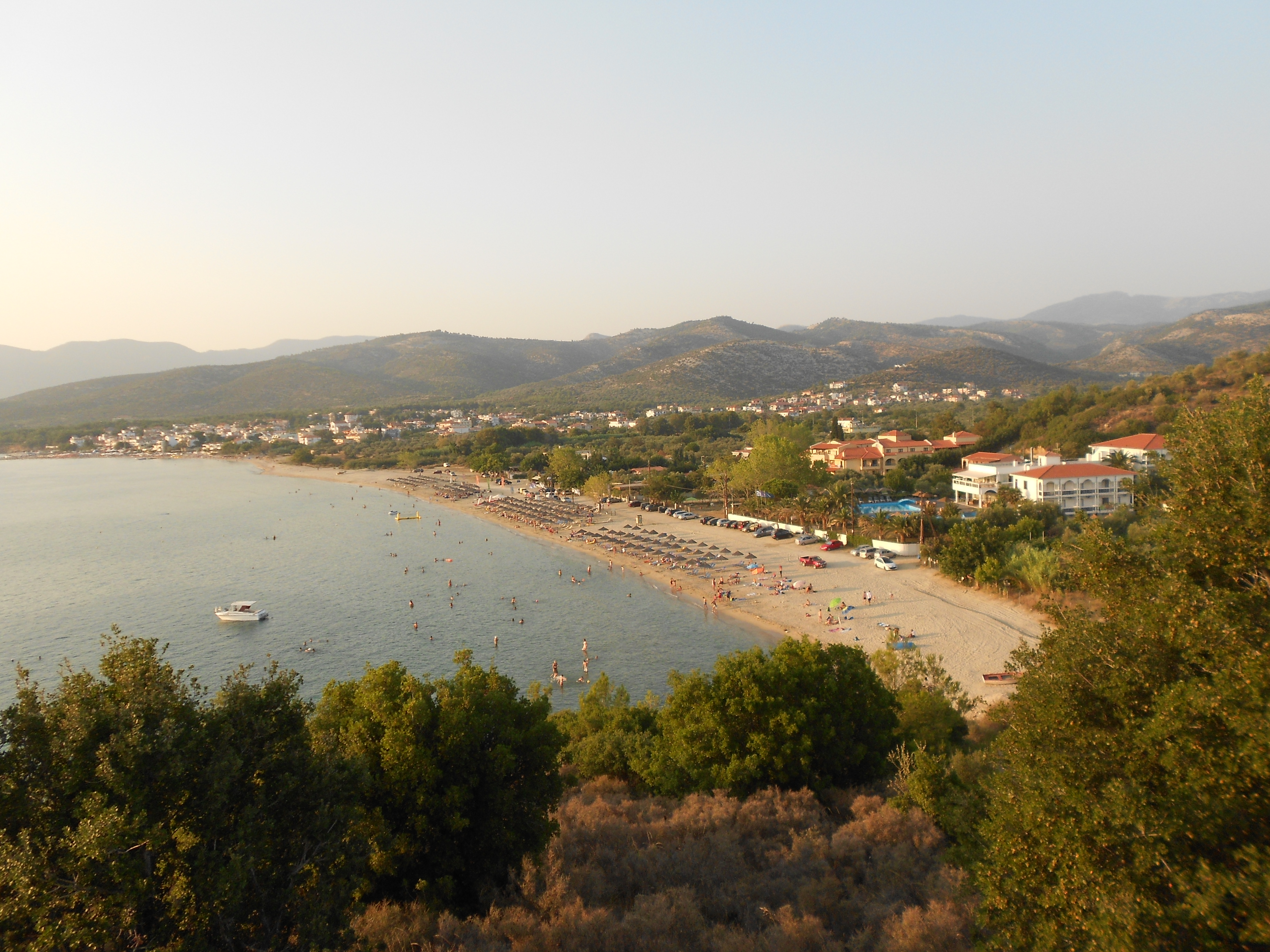 potos Tasos pogled sa brda. Grcka 2013 Dragan cvetkovic sopstvena slika Licensing